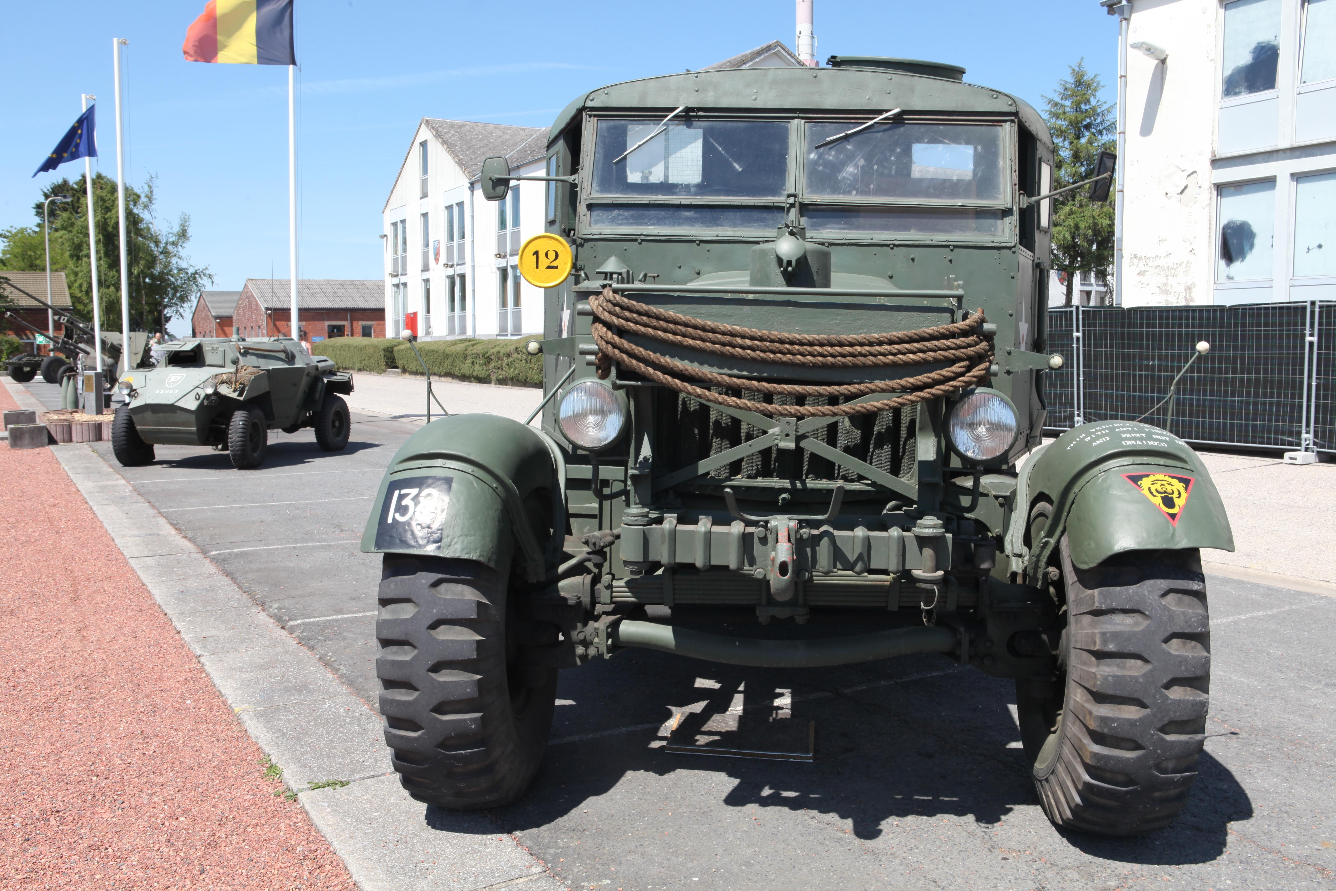 Scammell 6 x 4 truck